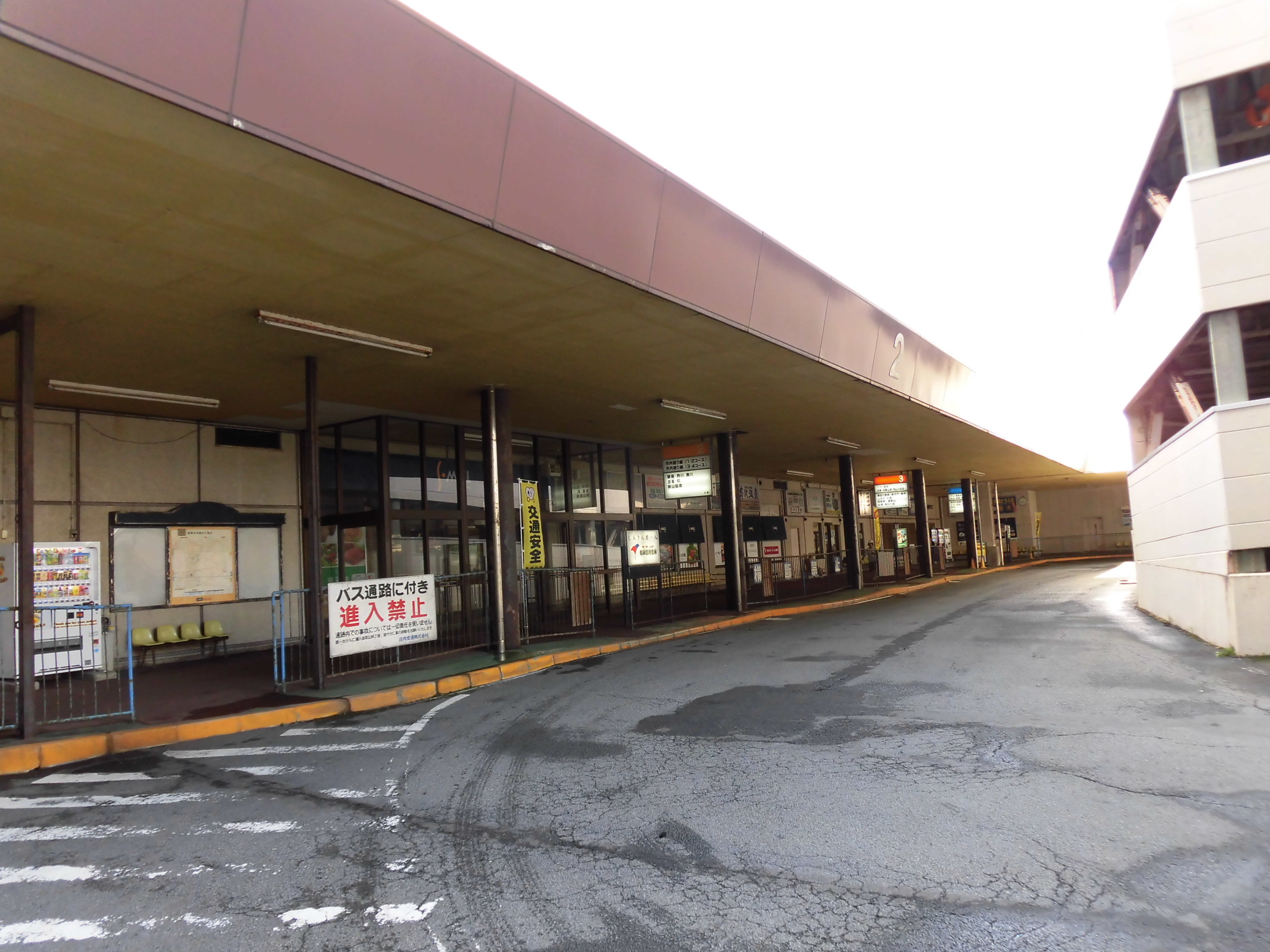 庄内交通エスモールバスセンター。山形県鶴岡市錦町に所在。